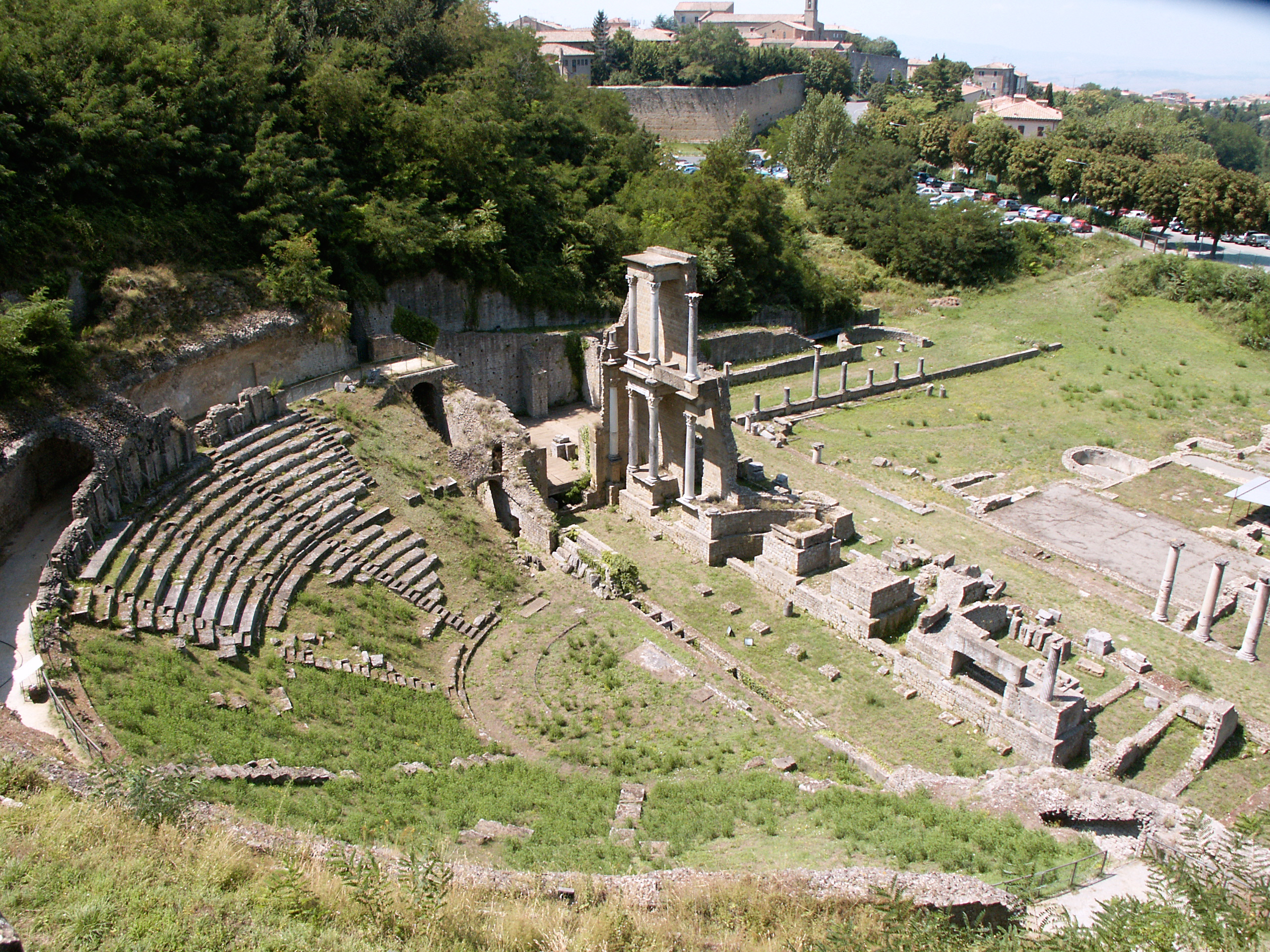 Théatre romain de Volterra